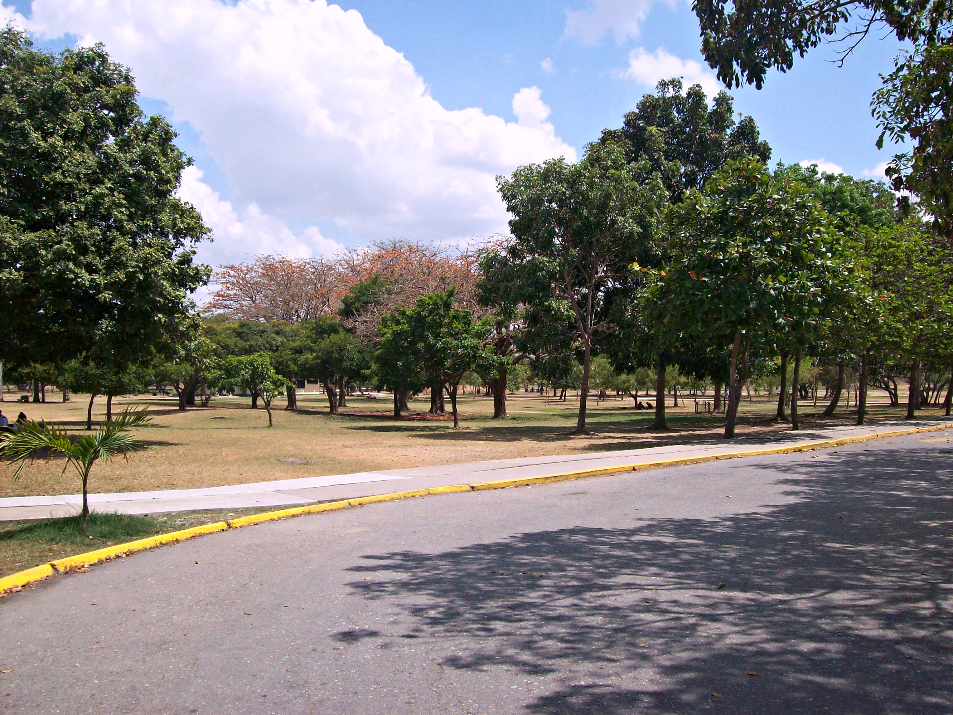 Parque del Este José María Ochoa Pile de Barquisimeto.